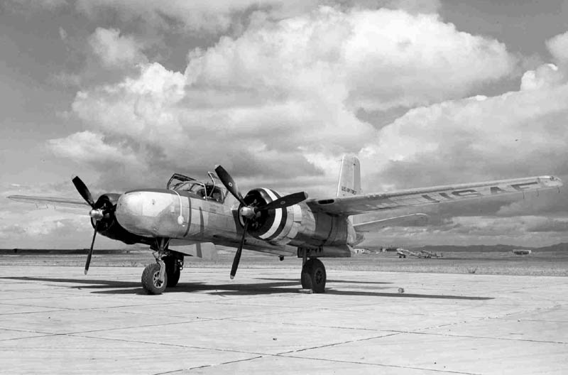 A-26usafreserve